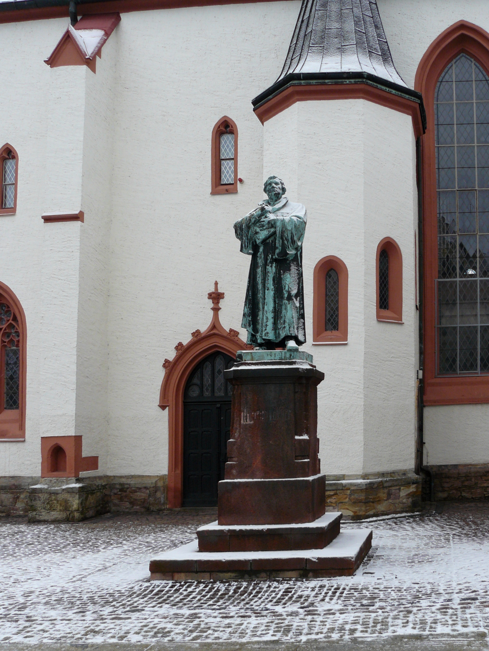 Martin-Luther-Denkmal vor der evangelischen St.-Nicolai-Kirche in Döbeln